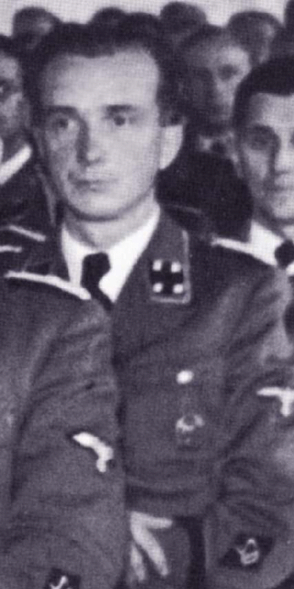 Wilhelm Schultze (18. září 1909 v Peine u Hannoveru - ???) studoval původně zvěrolékařství. V polovině roku 1941 byl převelen do protektorátní Prahy z berlínské centrály Hlavního říšského bezpečnostního úřadu (RSHA - Reichssicherheitshauptamt). Zastával funkci šéfa (kontrarozvědného) III. oddělení pražské řídící úřadovny Gestapa (policejní kriminalista, zpravodajský odborník, obávaný nacistický policejní expert a vyšetřovatel). Ve své funkci podléhal pouze šéfovi řídící úřadovny Gestapa. V protektorátu měl pověst světáka, jehož velkou slabostí byly ženy. Schopný a vlivný (měl přímý vliv i na K. H. Franka) Wilhelm Schulze (v hodnosti SS - Hauptsturmführer) vybudoval během druhé světové války se svým týmem výkonný zpravodajský aparát. (V roce 1943 navíc referát IV-N.) Byl povýšen na kriminálního radu, vyznamenán Válečným záslužným křížem II. i I. třídy s meči a osobně pochválen Himmlerem. V době Pražského květnového povstání 1945 se svou ženou a čtyřmi dětmi opustil Prahu. Jeho poválečné osudy nejsou známy. Podle některých zdrojů byl agentem britské tajné služby.